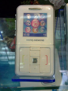 BenQ-Siemens EF51